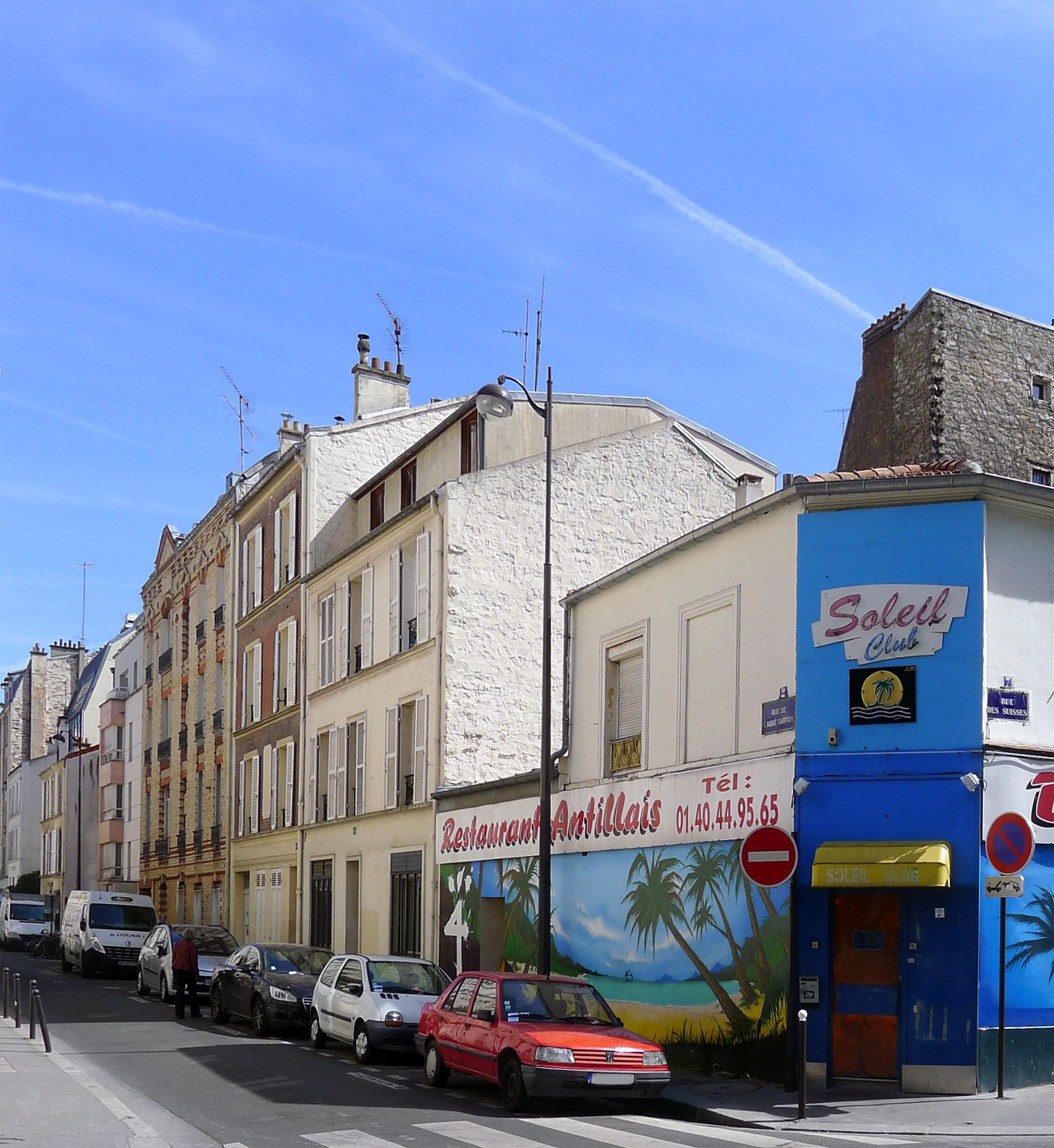 Rue de l'Abbé-Carton - Paris XIV